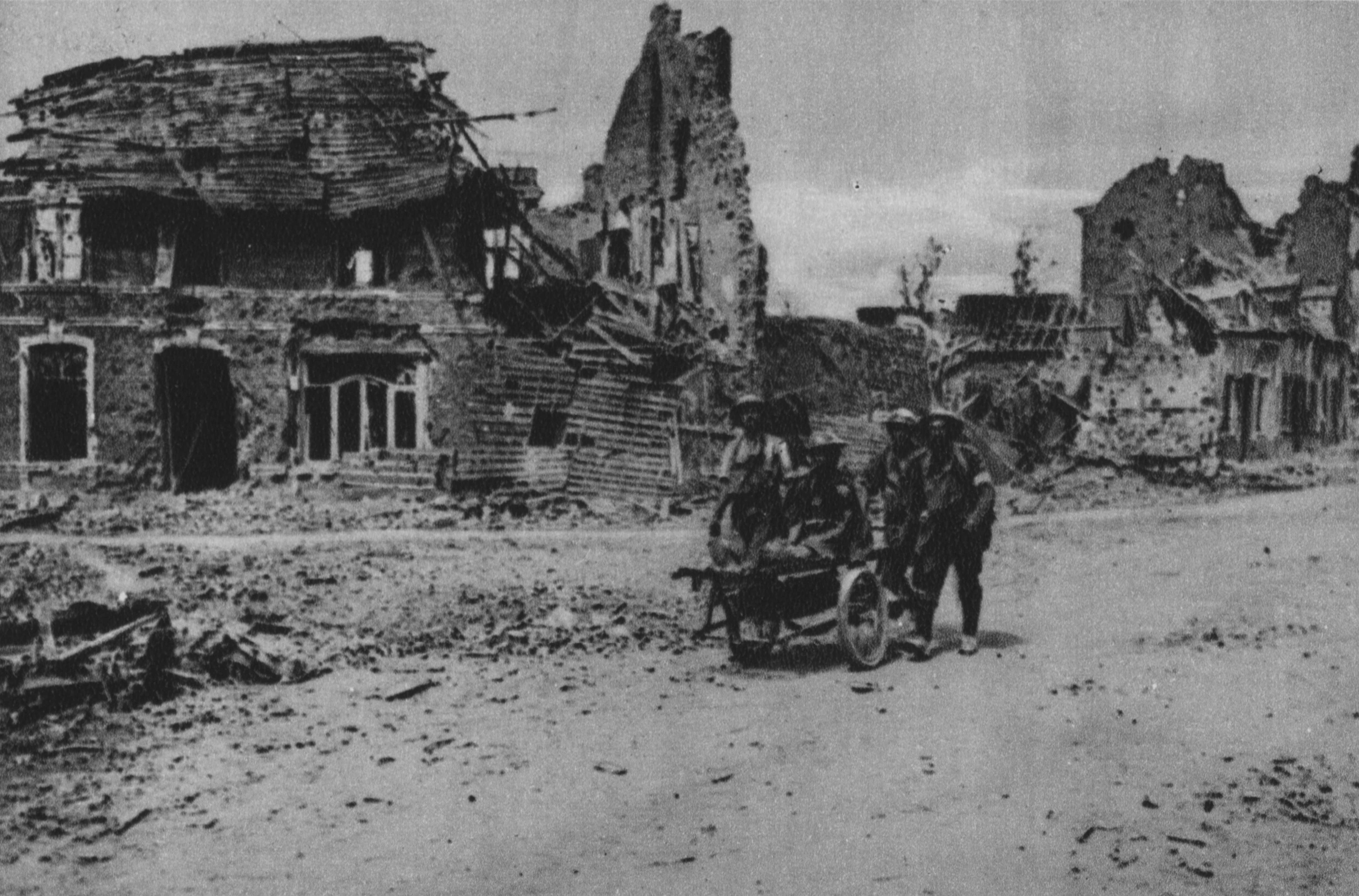 Sanitätsmannschaften auf dem Weg zum Feldlazarett in Albert (23. August 1918).